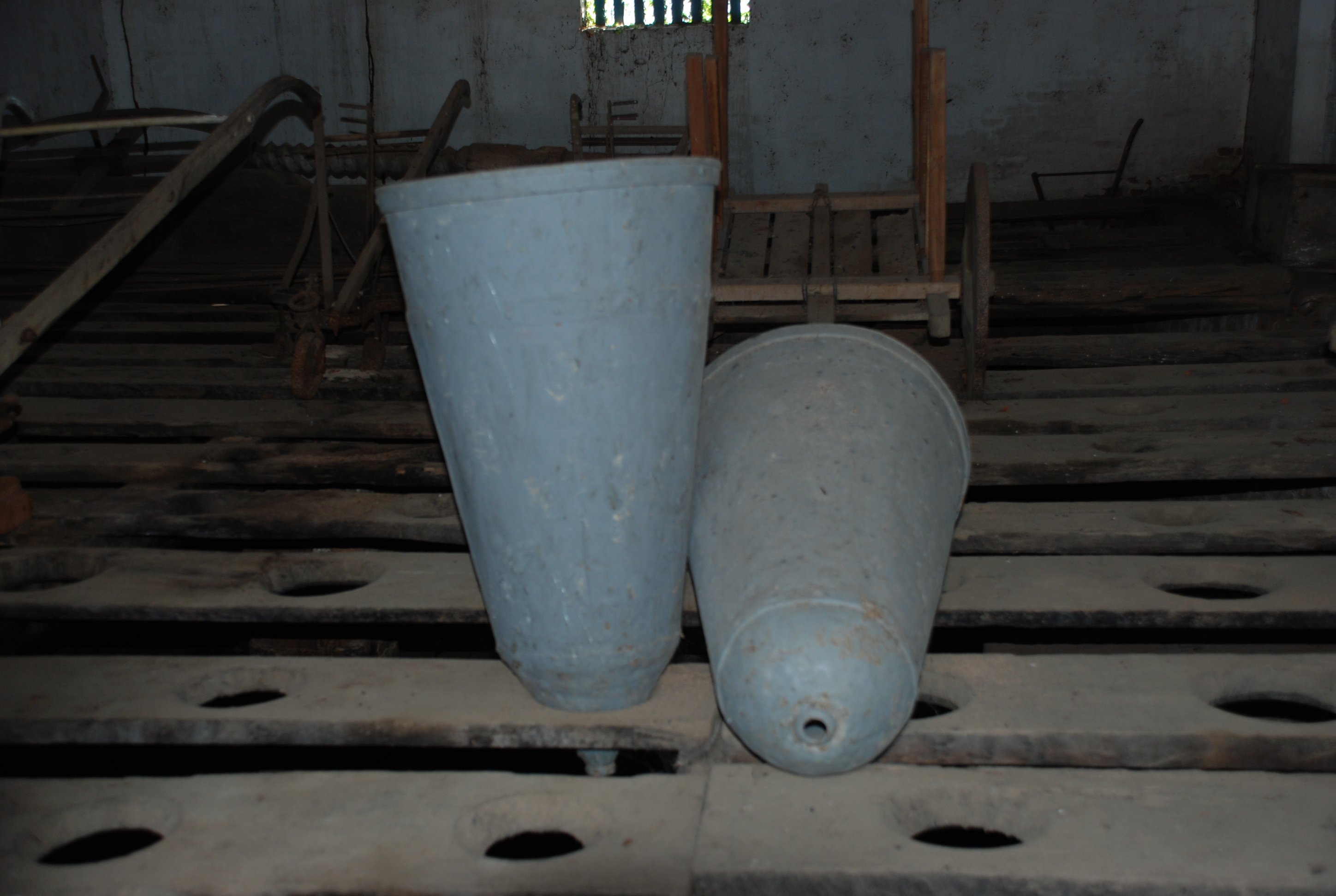 Formas de pão-de-açúcar em casa de purgar desativada. Engenho Santa Fé, Nazaré da Mata, Pernambuco, Brasil